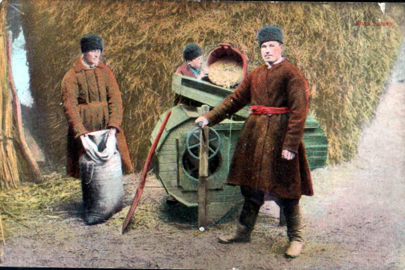 Веялка. Дореволюционная открытка. Издательство «Разсвет», Киев